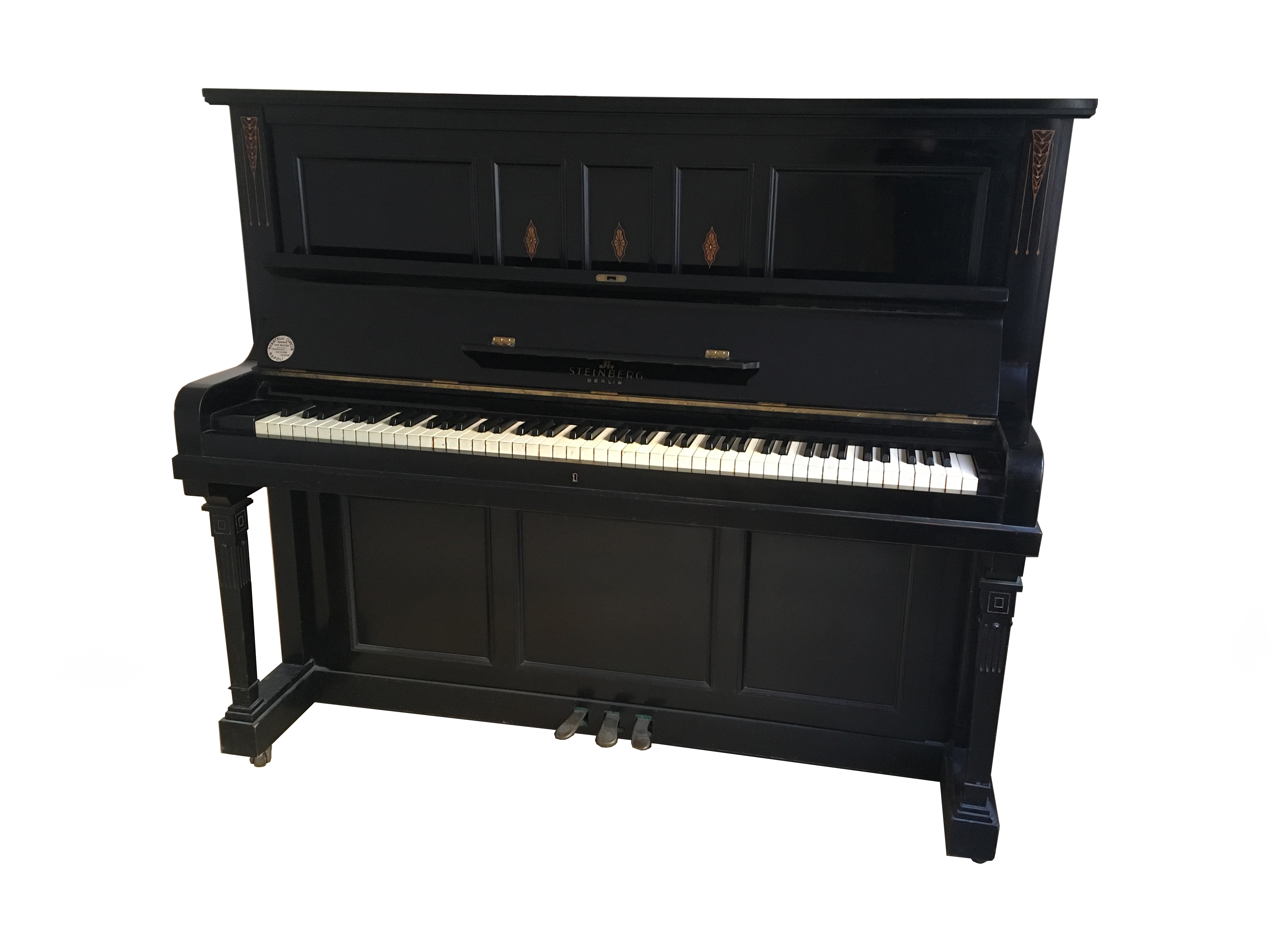 Pianoforte Verticale conosciuto anche come pianoforte a muro.